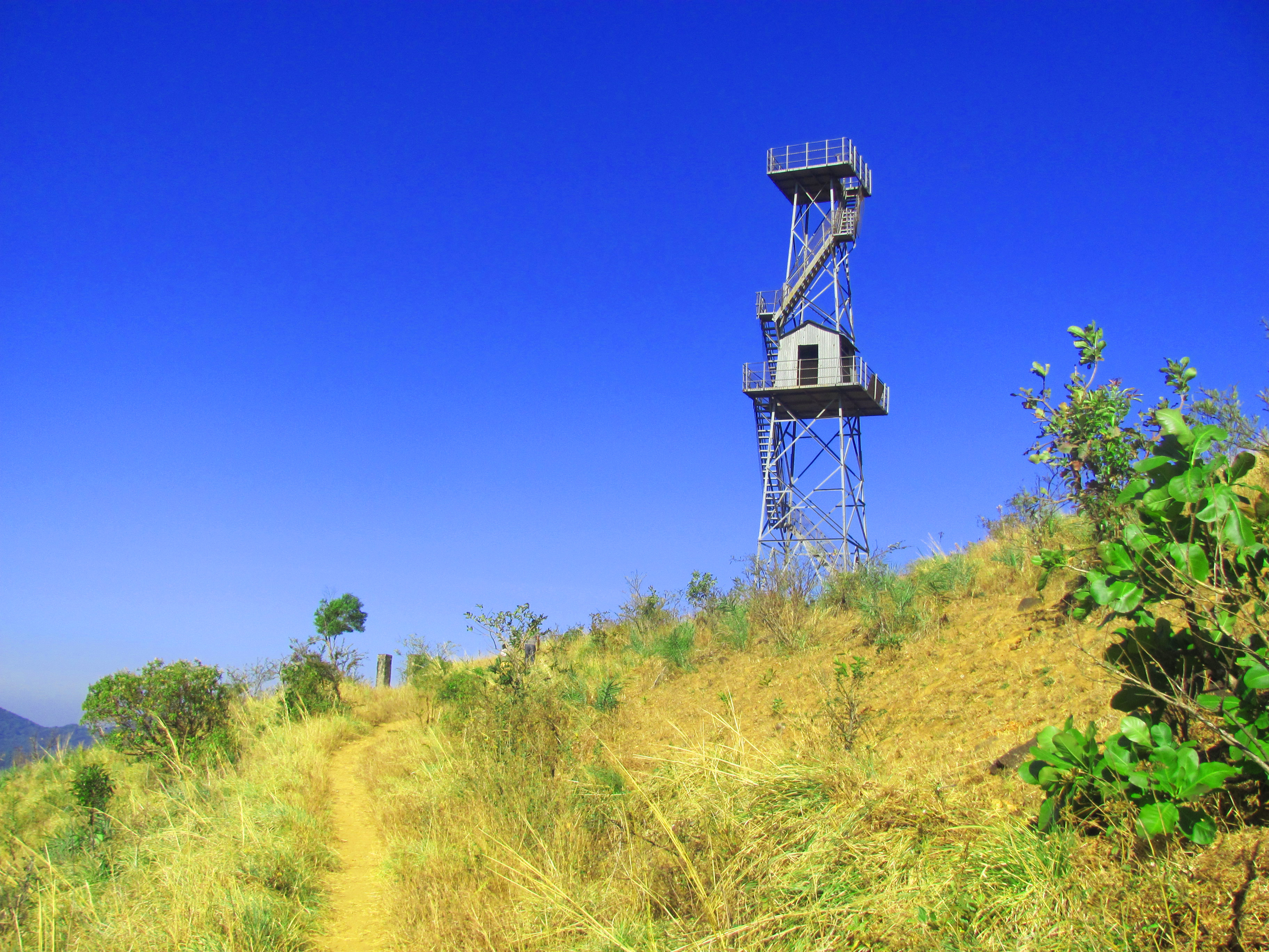 പക്ഷിപാതാളം വാച്ച് ടവർ